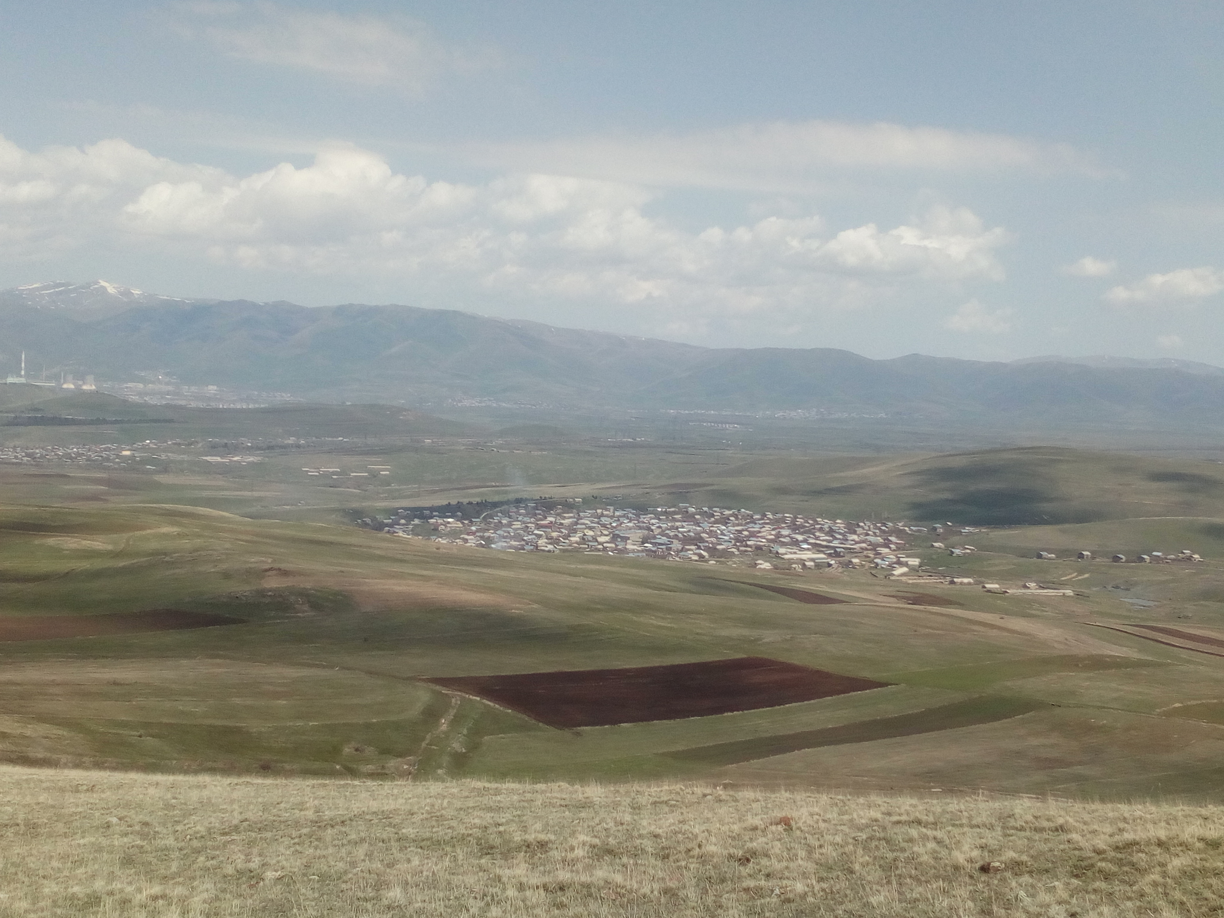 Լեռնանիստ գյուղը. տեսքը Մենակսար լեռան լանջից